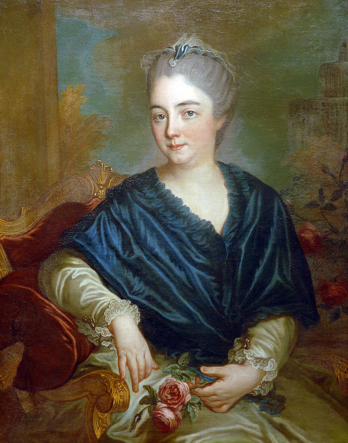 Amalie Zephyrine von Salm-Kyrburg, Fürstin von Hohenzollern-Sigmaringen (1760-1841)